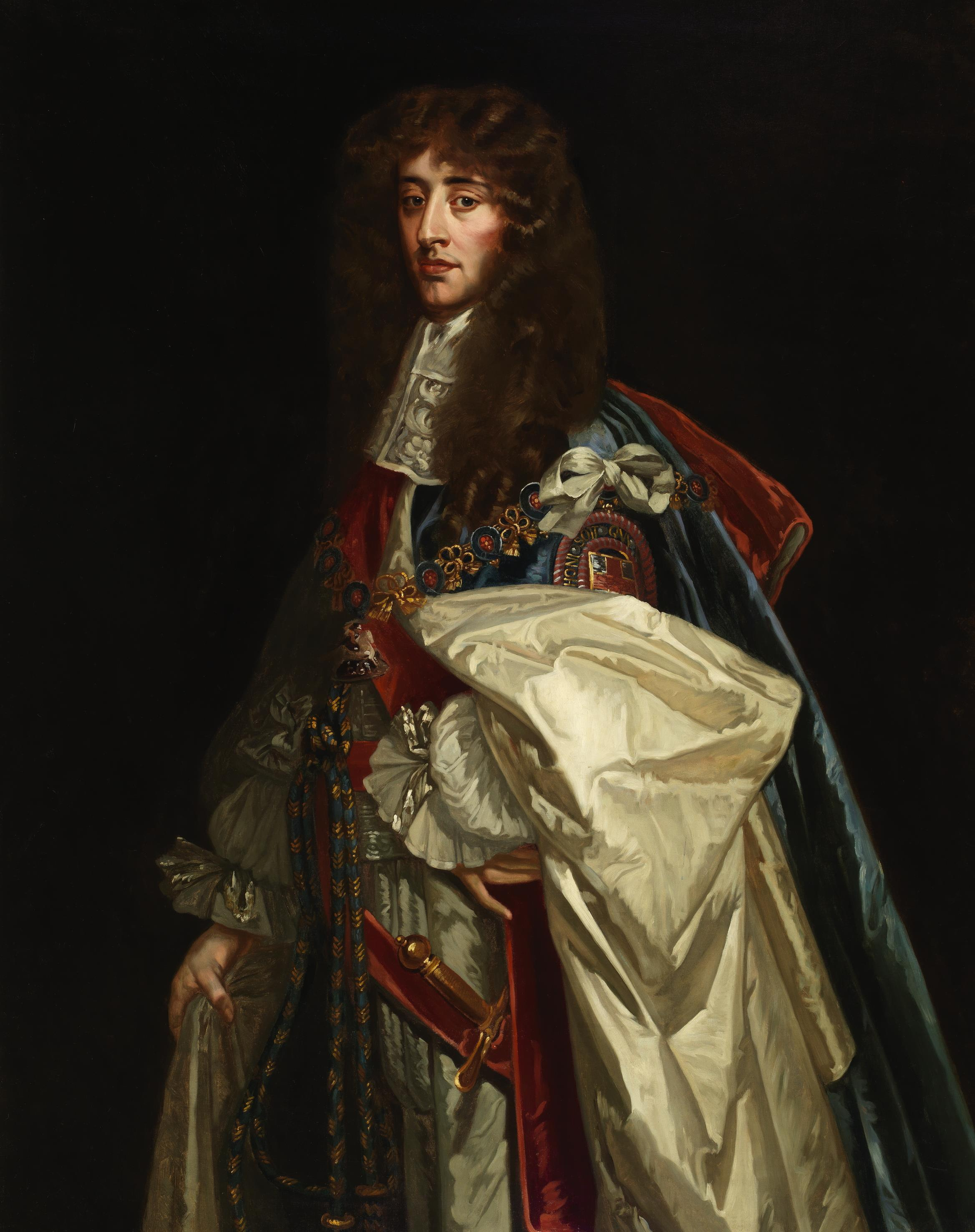 Retrato del aristócrata británico James Fitz-James (1670-1734), que fue hijo ilegítimo del rey Jacobo II de Inglaterra y el primer duque de Berwick.